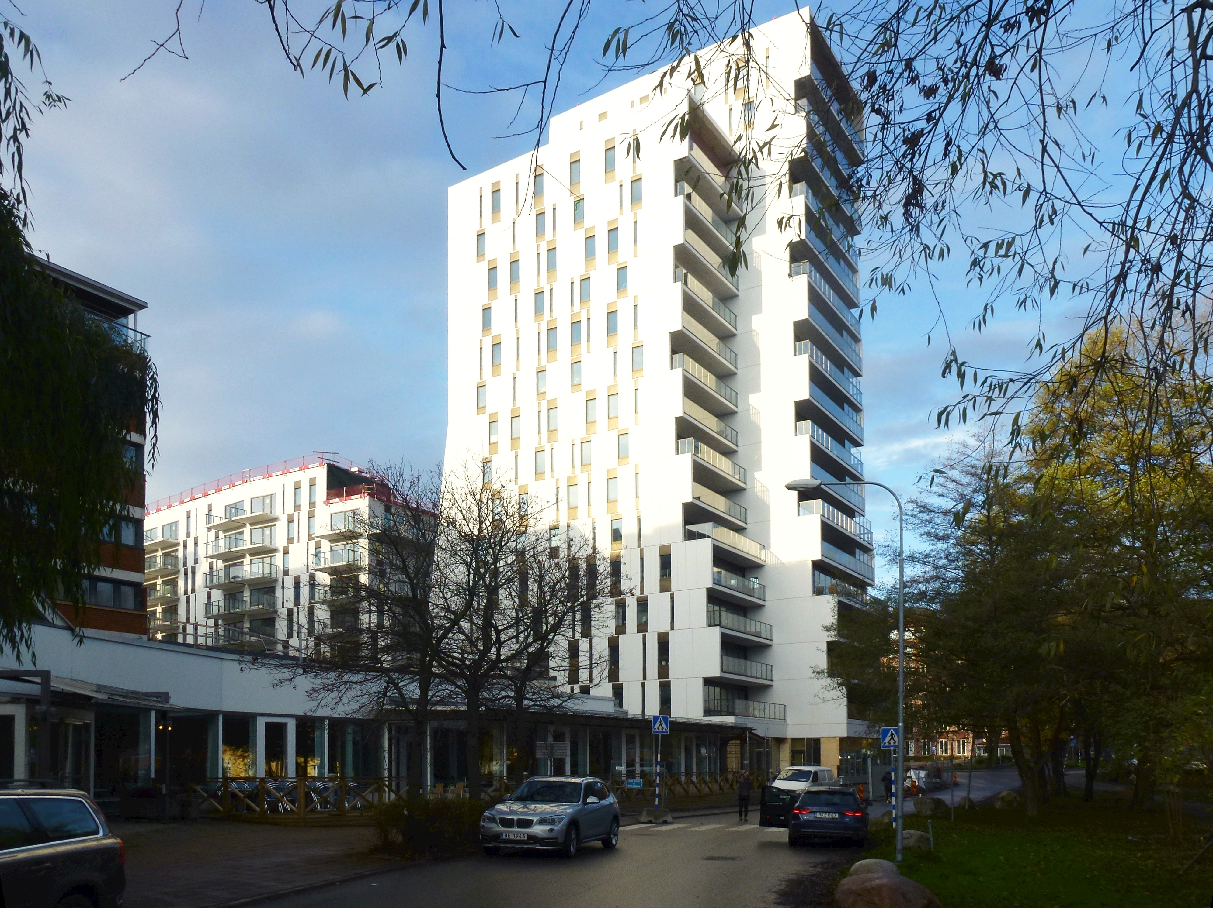 Alviks torn under uppförandet